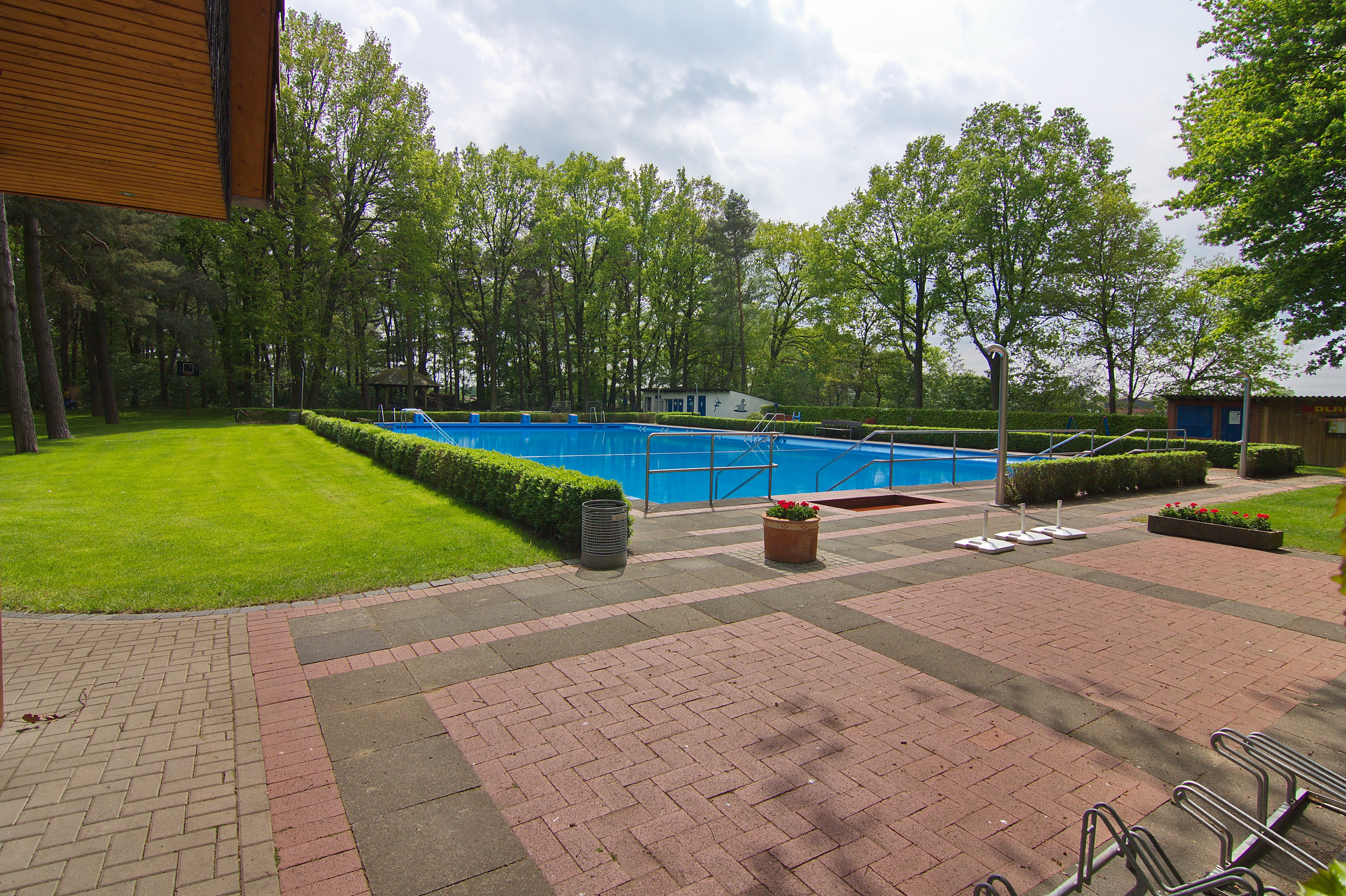 Waldbad Wulfelade von 1937 bei Wulfelade (Neustadt am Rübenberge), Niedersachsen, Deutschland.